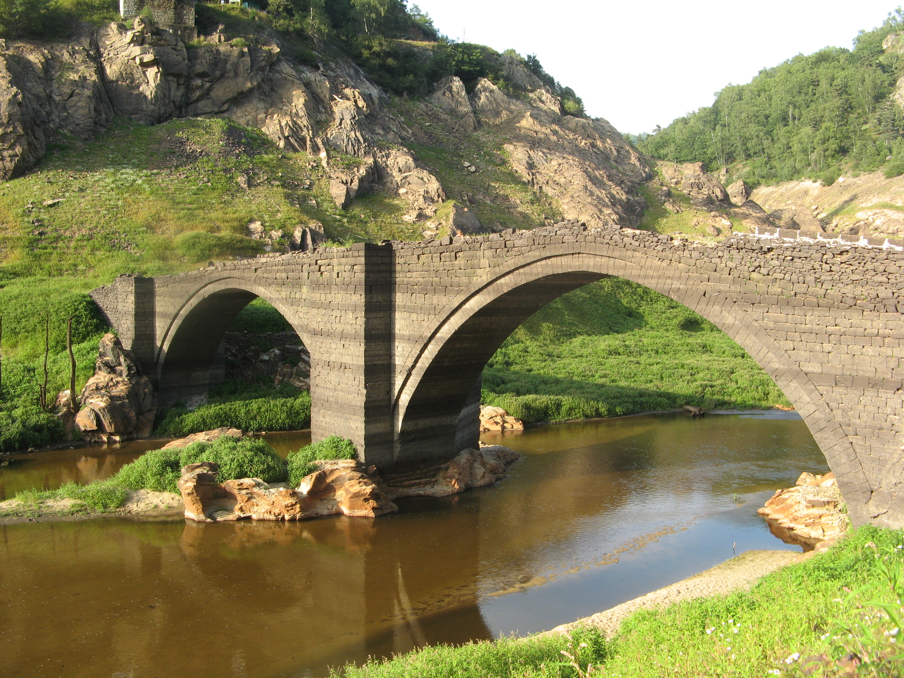 Pont de Tréboul à Ste Marie (Cantal) lors de la vidange du réservoir de Sarrans en 2014.